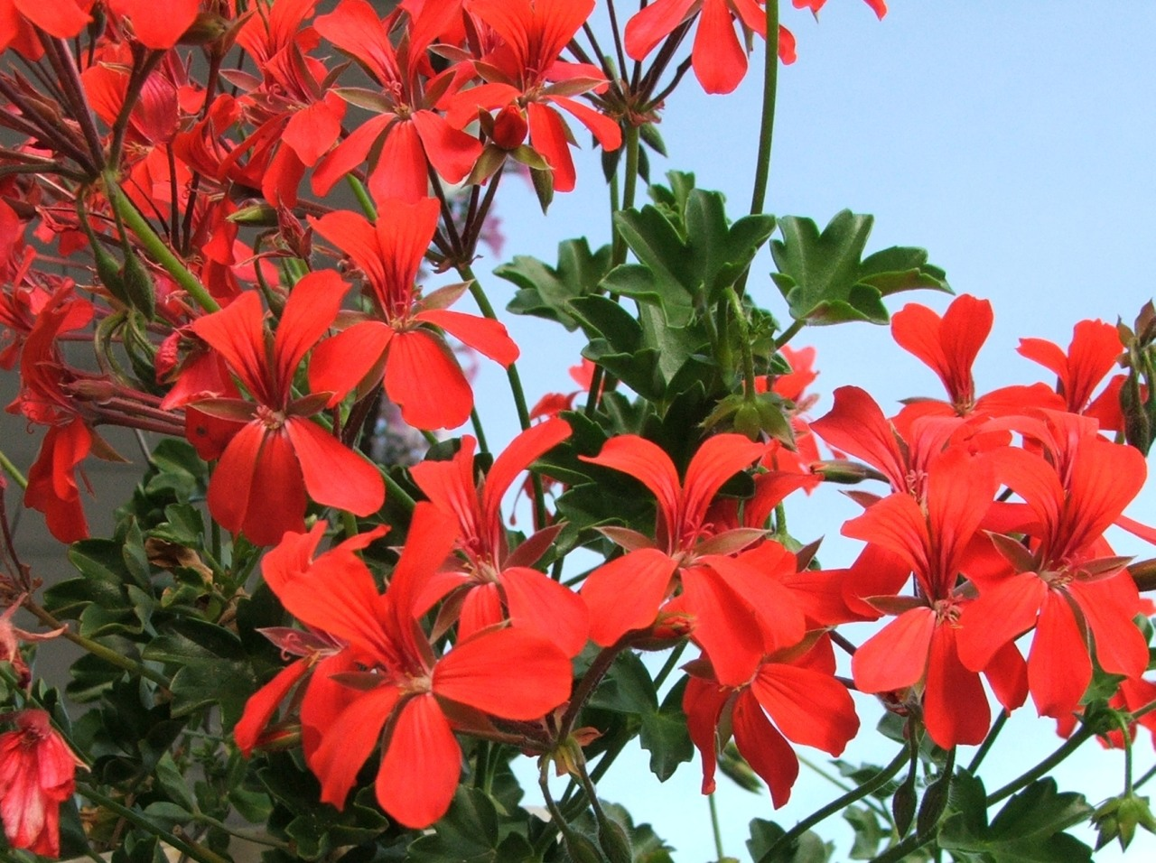 Pelargonium peltatum hort. (hybrids, cyltyvar)